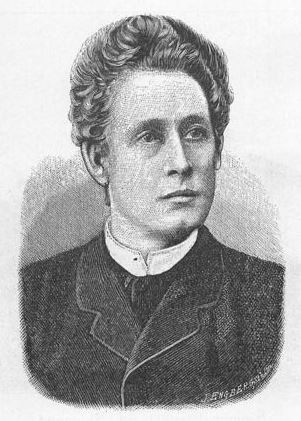 Anders Eriksson (1853-1884), svensk sjömansmissionär.